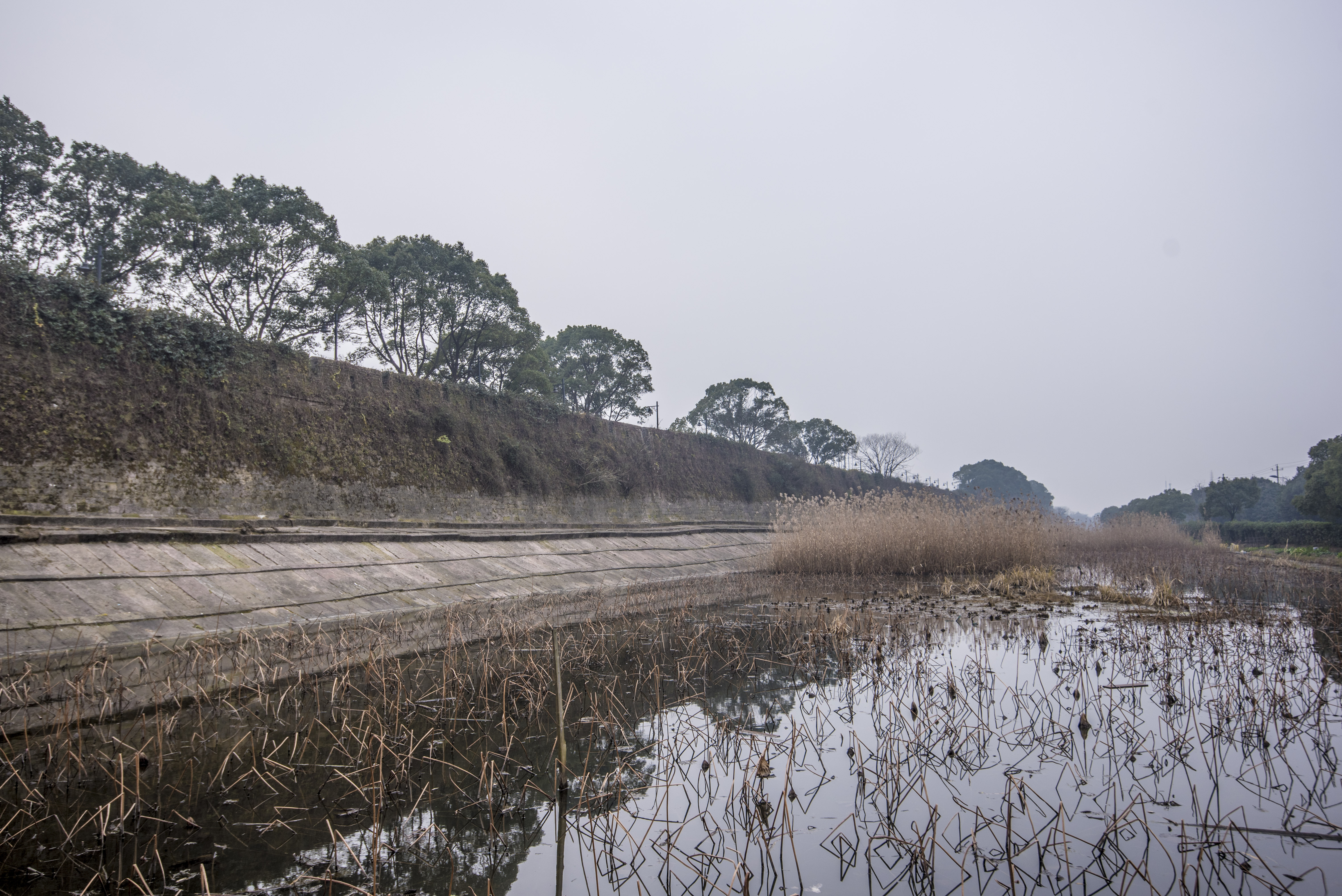 镇海后海塘